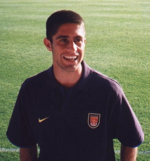 Sylvinho